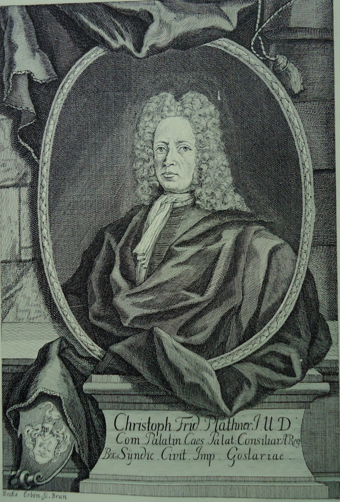 CFP ca. 1715